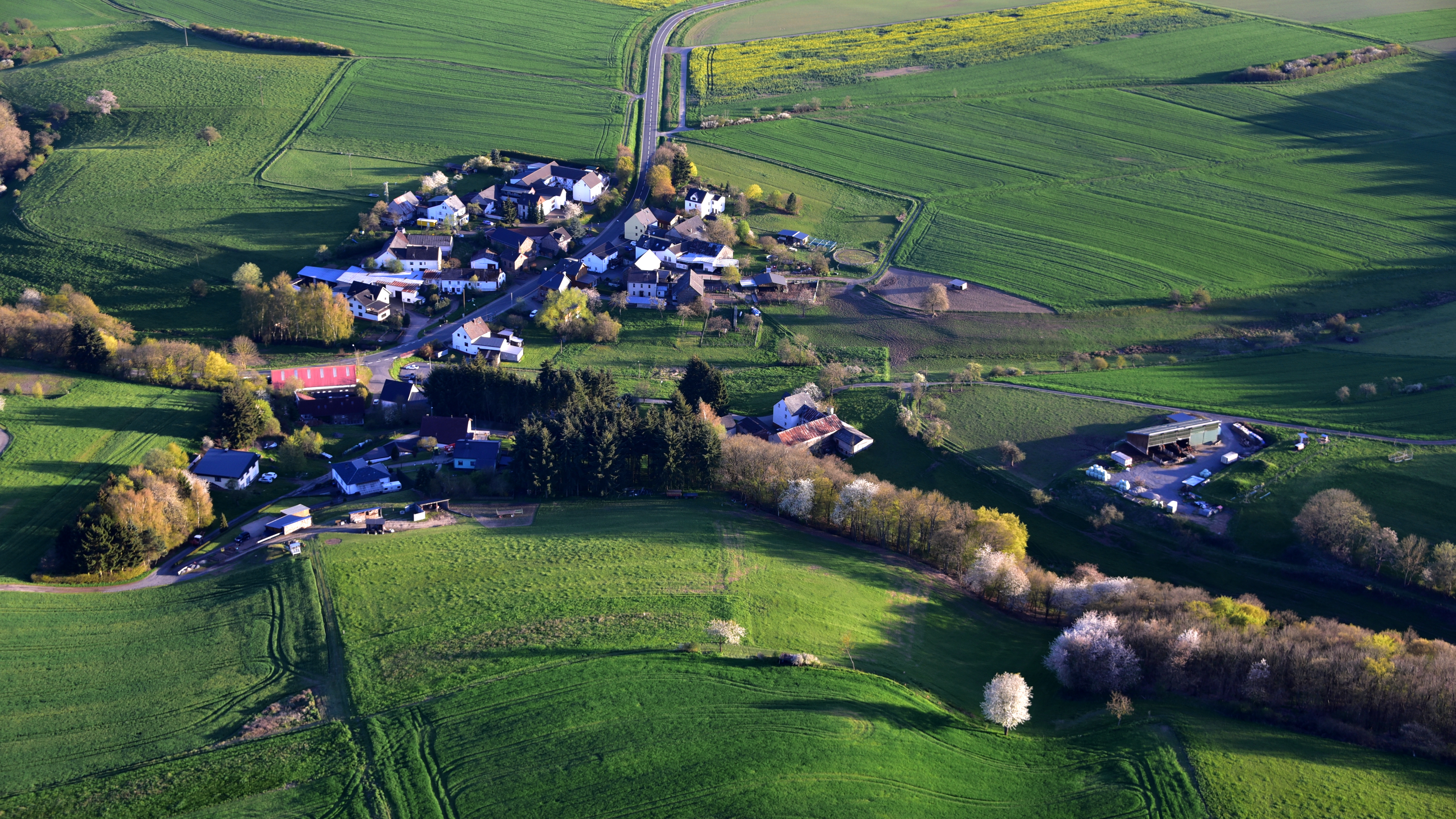 Lind, Luftaufnahme (2016)